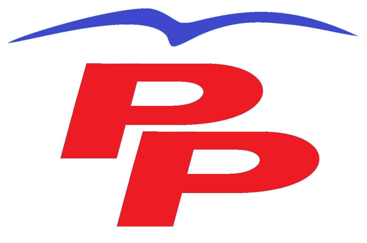 Antiguo Logo del Partido Popular, en la época de José Maria Aznar